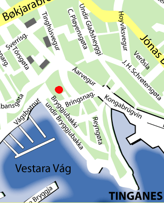 Ausschnitt aus dem Stadtplan von Tórshavn, Lage der Tórshavner Domkirche markiert.